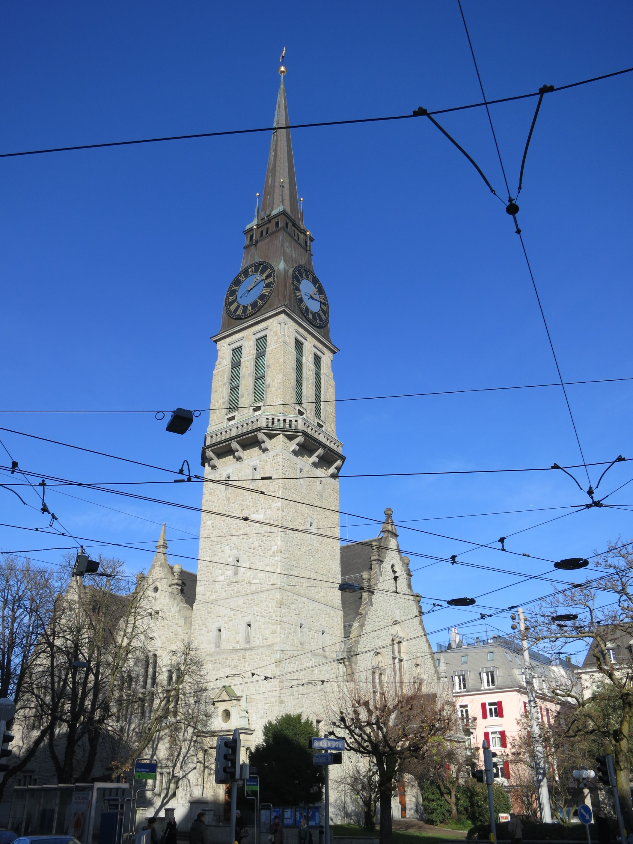 St. Jakobskirche, Zürich-Aussersihl, Schweiz